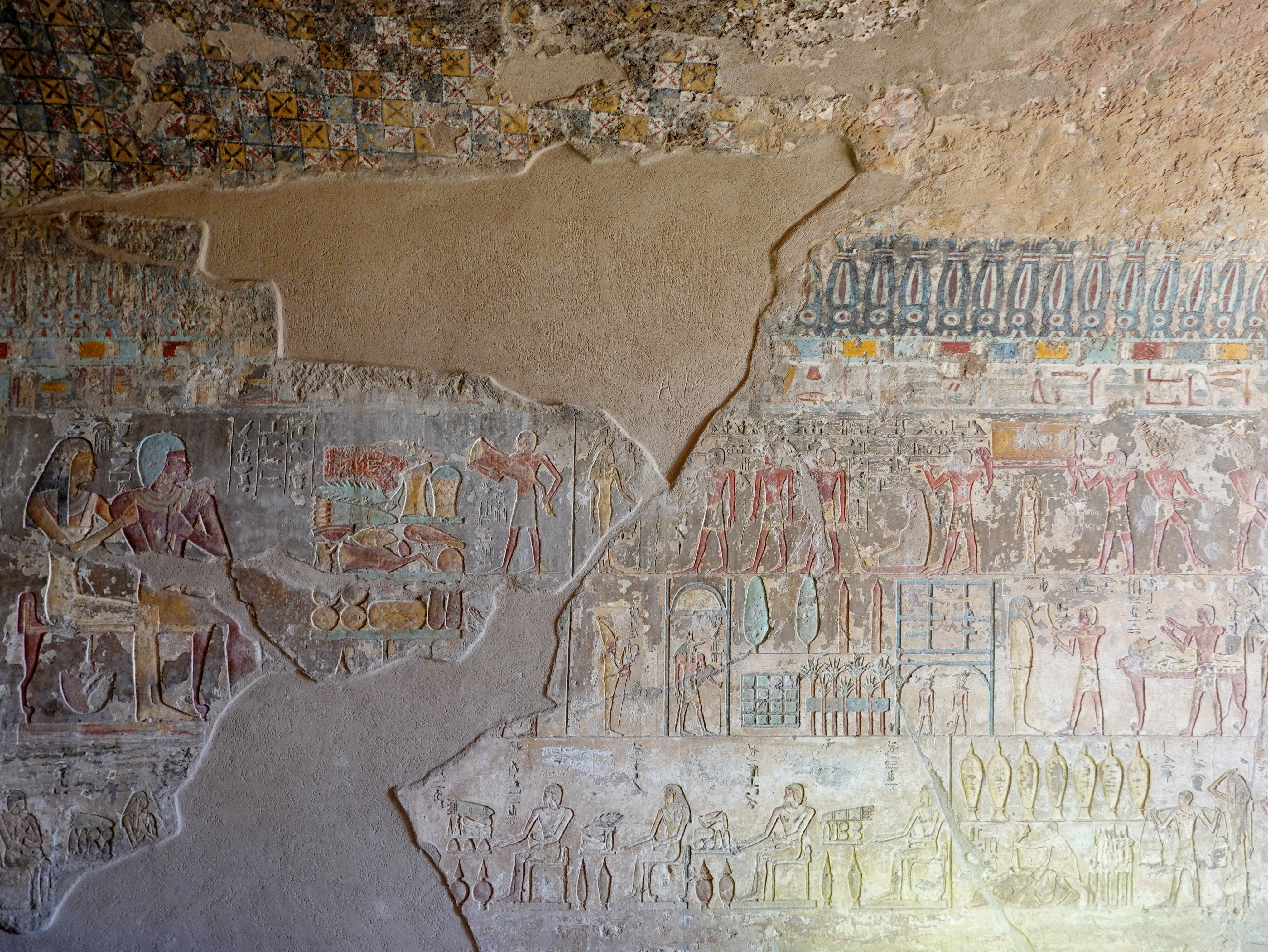 Felsengrab des Renni unter den Felsengräbern des altägyptischen Necheb bei el-Kab, Ägypten